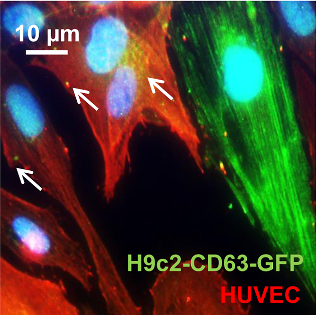 Fig 4. Transferencia de exosomas desde Cardiomiocitos hacia Endoteliocitos. (C) Inmunotinción representativa de co-cultivos de células cardiomioblastos H9C2-CD63-GFP Anti-GFP (verde) y células endoteliales de la sangre del cordón umbilical HUVEC; anti-CD31 (rojo). Las células cardiomioblastos H9C2-CD63-GFP producen exosomas con GFP fusionados a la proteína CD63. Las imágenes ilustran la fluorescencia de GFP de los exosomas de cardiomioblastos CD63-GFP, dentro de células de endotelio positivas para CD31 (rojas) después de 24 h de incubación. Barra 10µm.